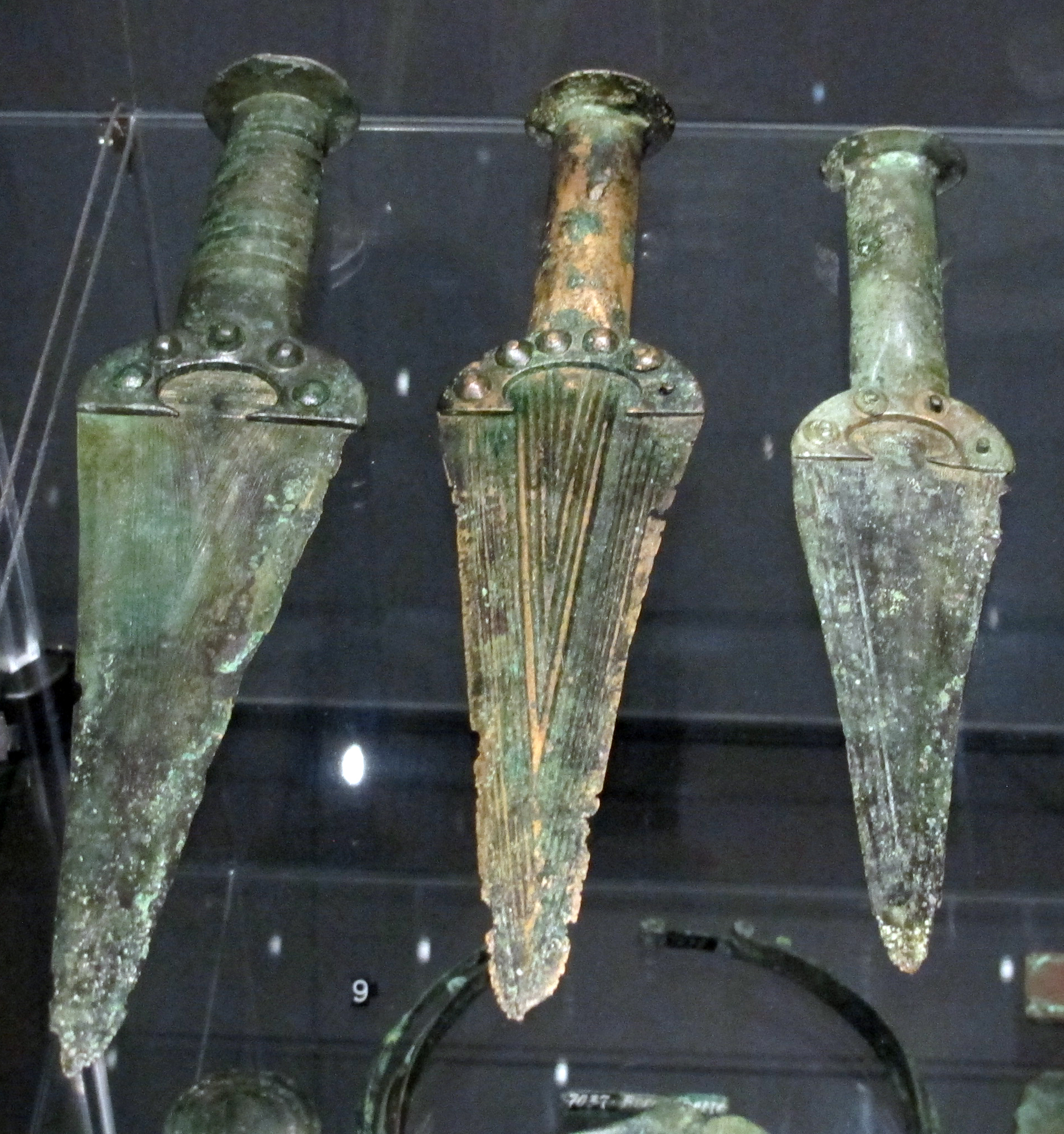 Losanna, Svizzera